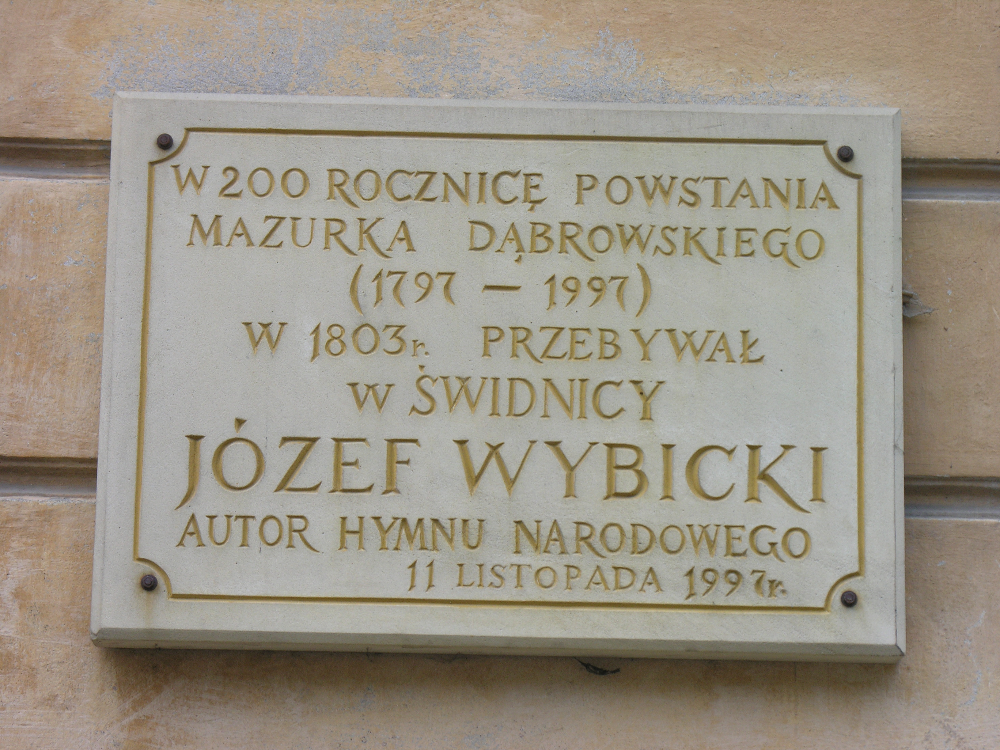 Tablica ku czci Józefa Wybickiego w Świdnicy na budynku ratusza.